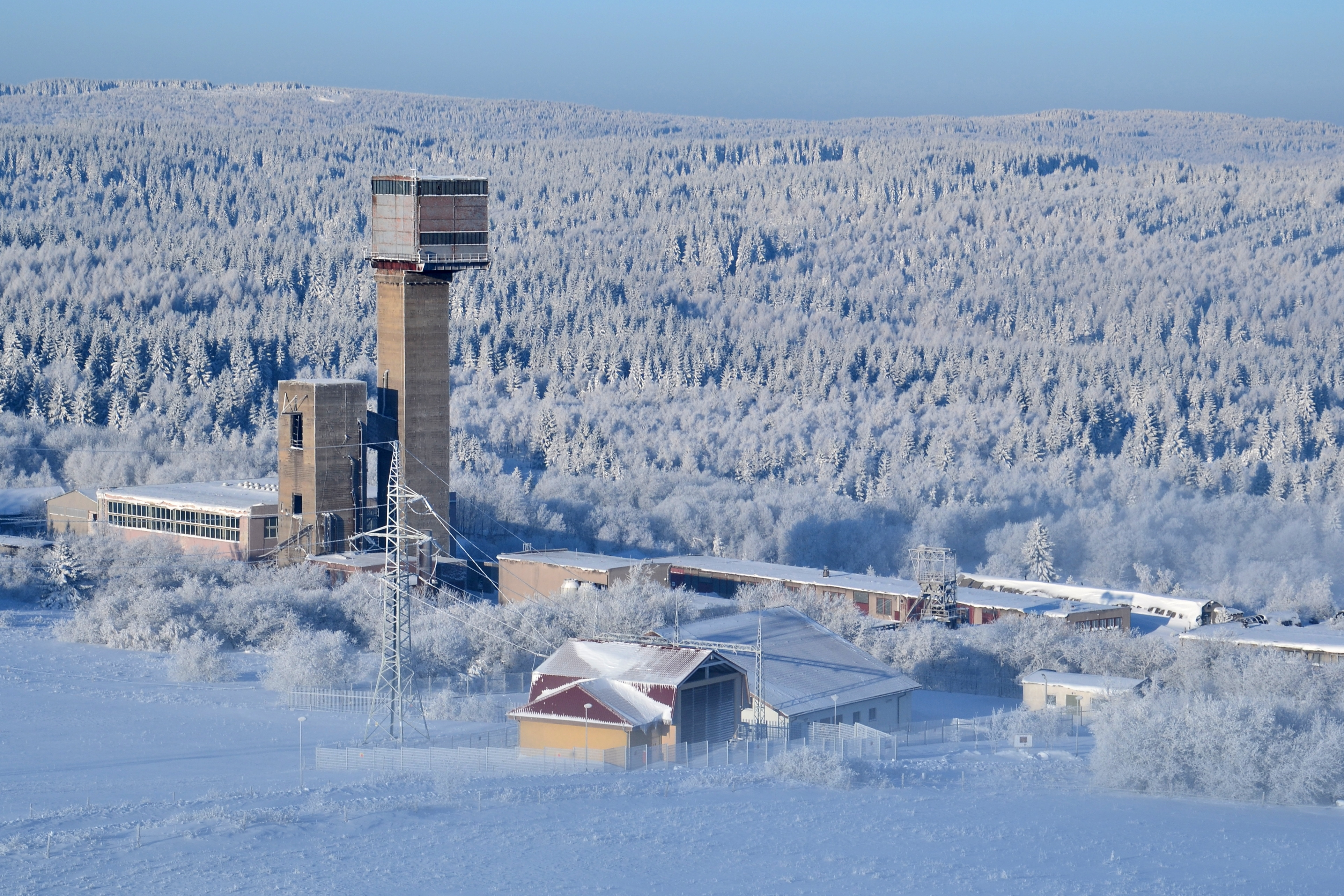 Měděnecký důl